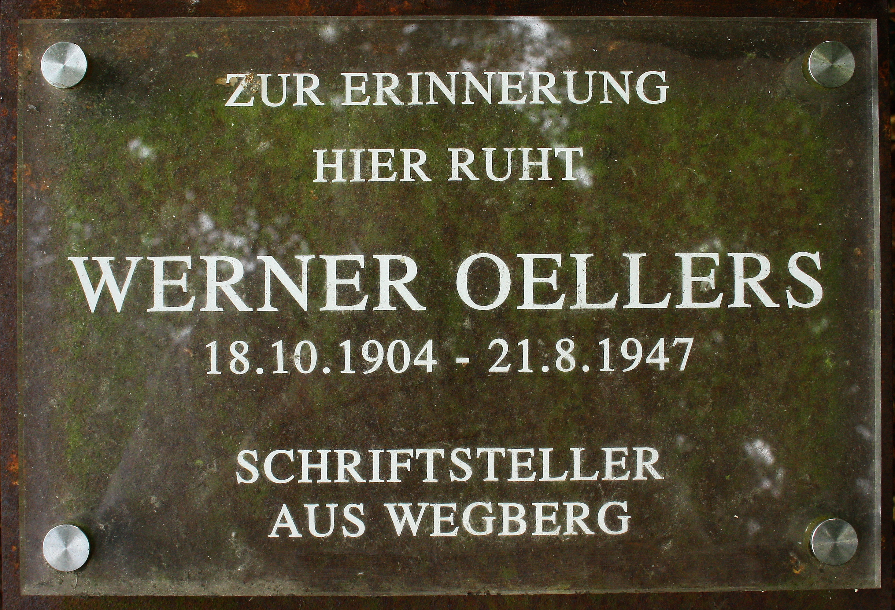 Gedenktafel für den Schriftsteller Werner Oellers